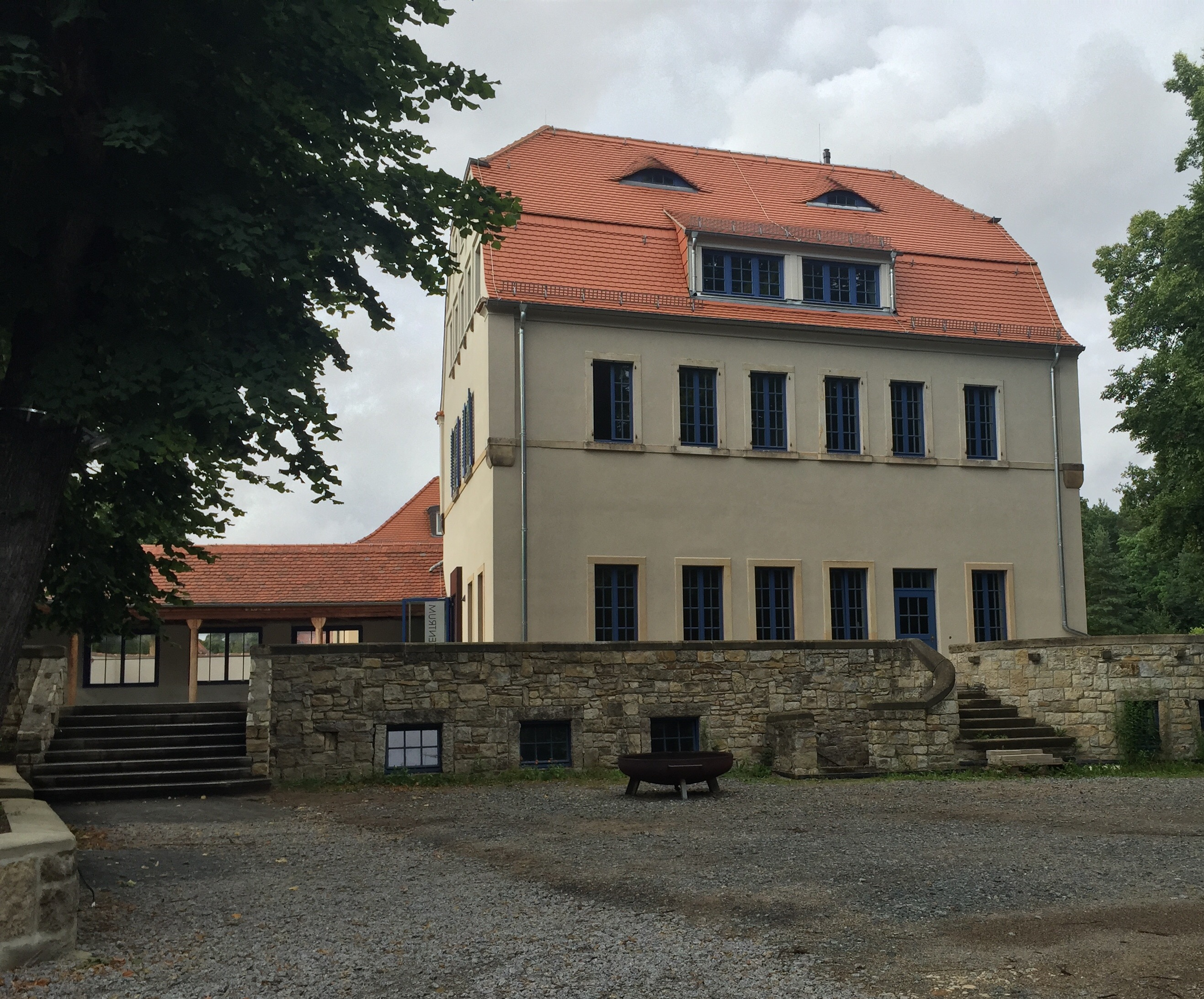 bürgerzentrum Waldschänke Hellerau, Dresden Moritzburger Weg - Am grünen Zipfel Dresden